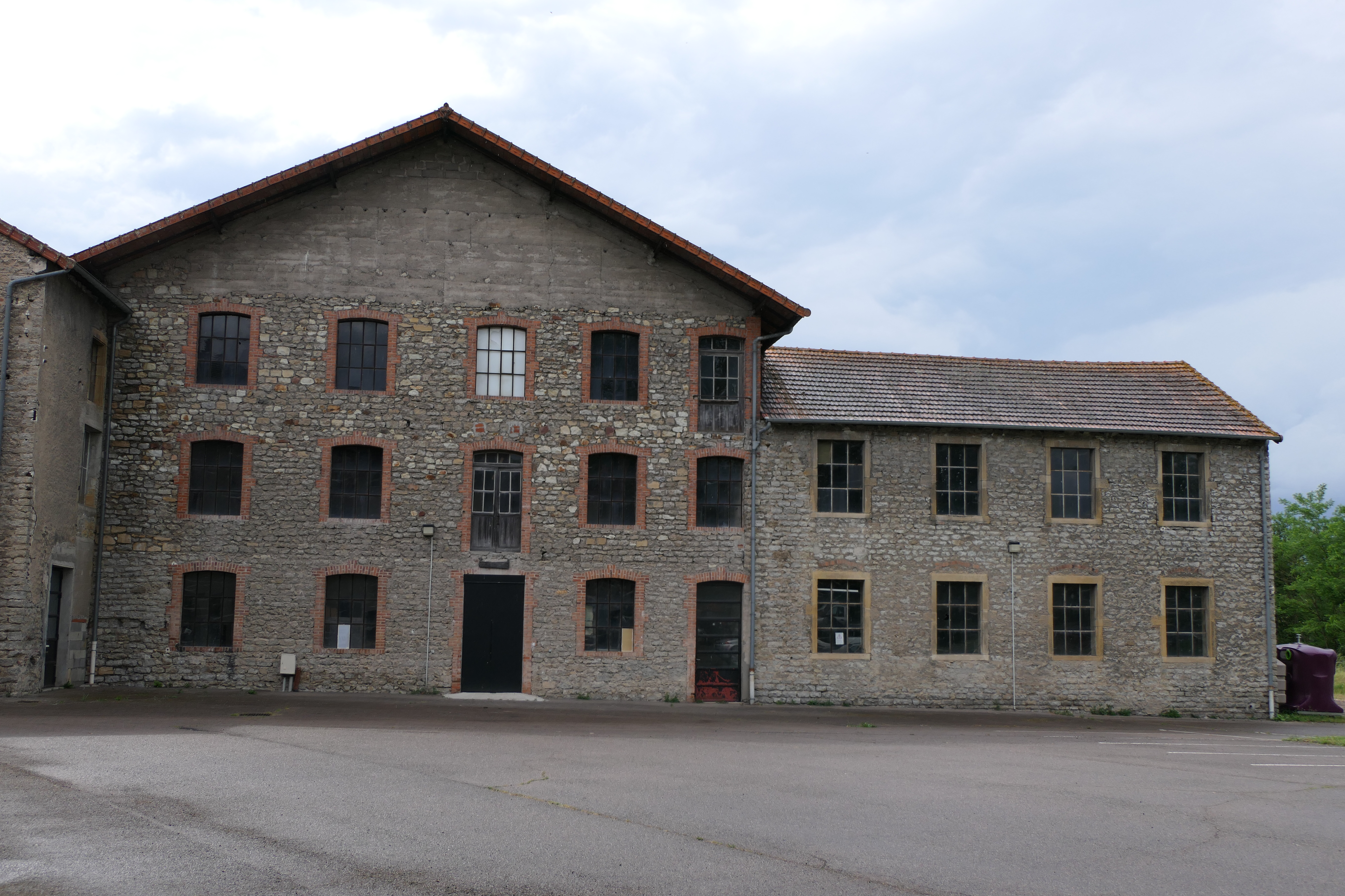 Molinet, bâtiments de l'ancienne poterie de la Broche